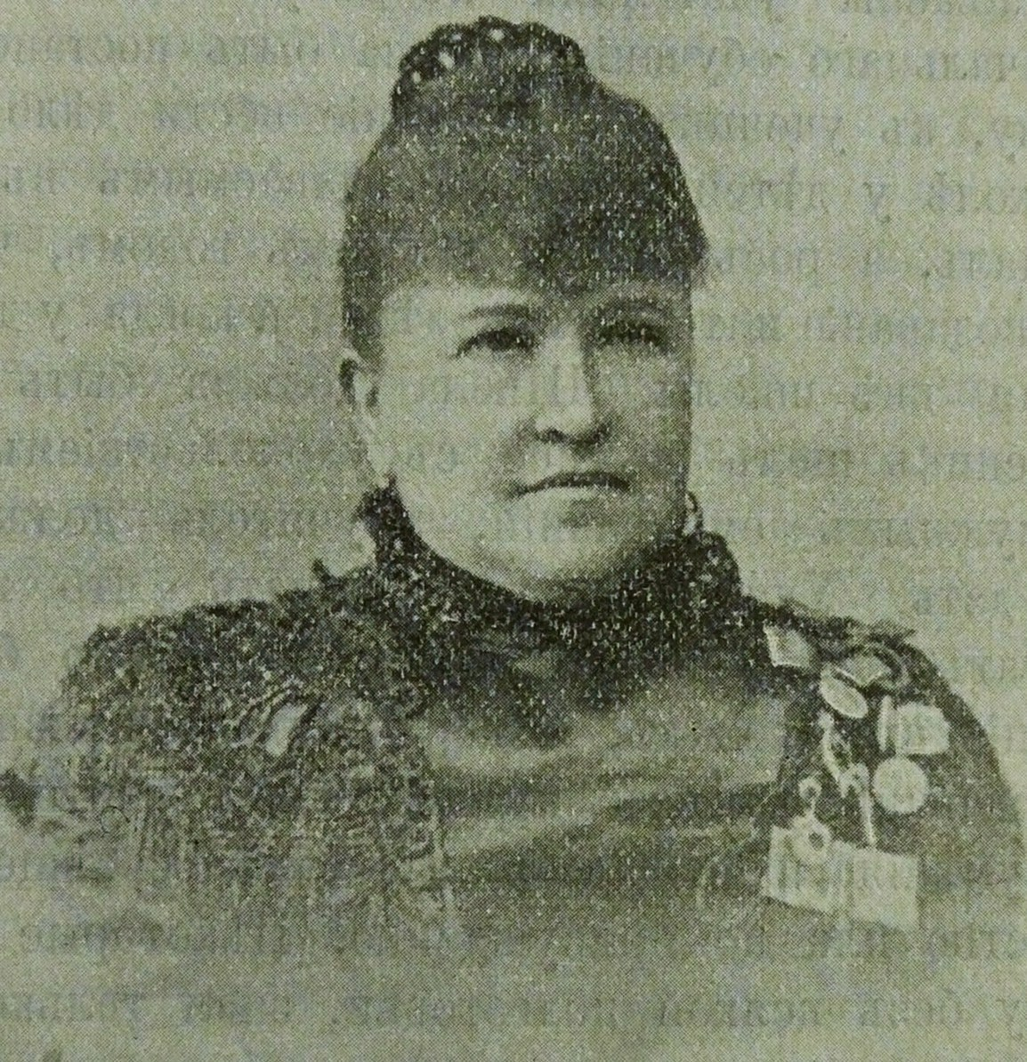 Председательница Казанского Управления Российского общества «Красного Креста», почётный член «Казанского Общества Трезвости» Вера Дмитриевна Мещеринова